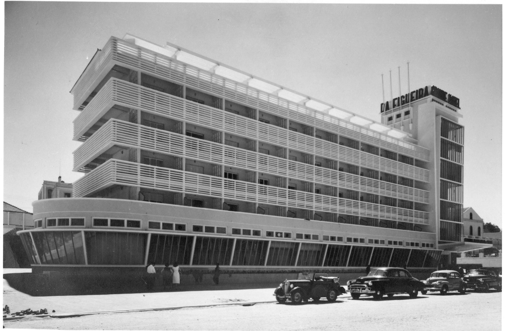 Plano do Grande Hotel da Figueira da Foz já concluído